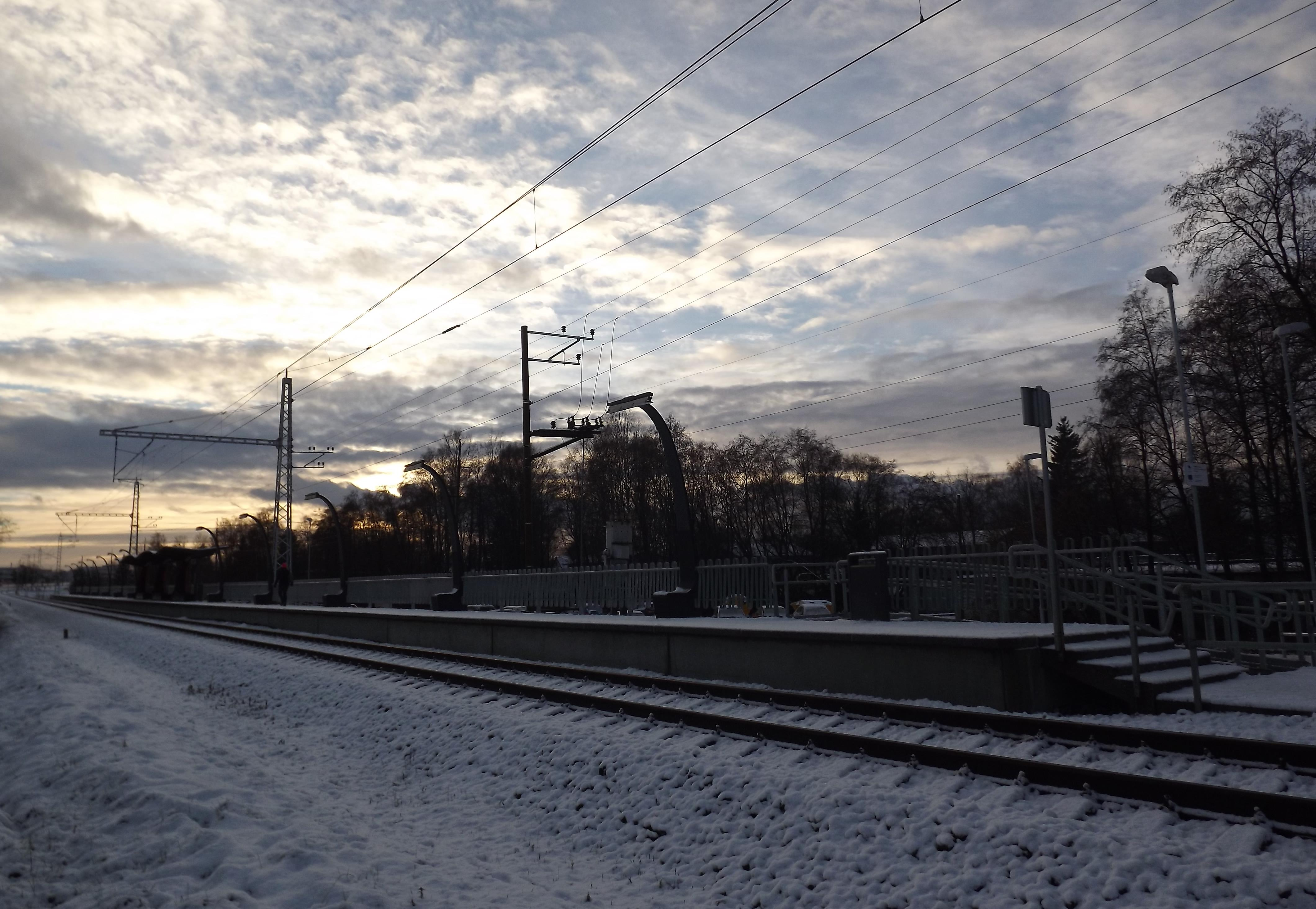 Laagri raudteepeatus (2013)